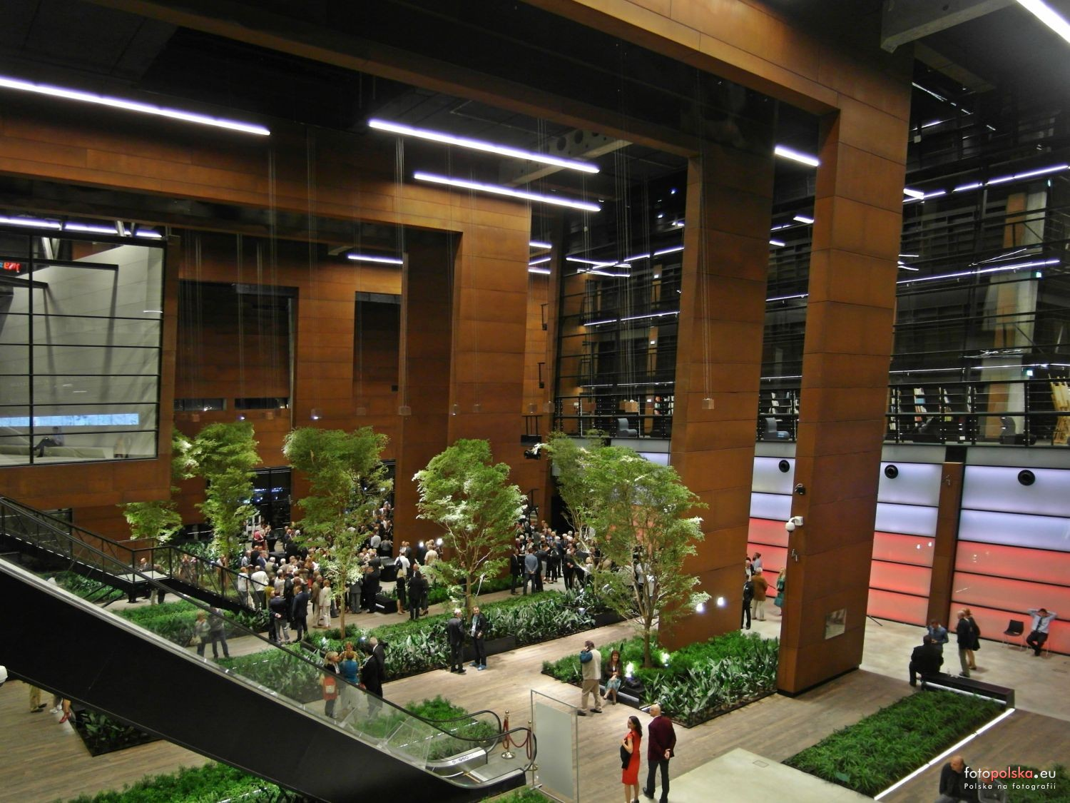 Europejskie Centrum Solidarności w Gdańsku. Centralna część ECS-u, ogród zimowy. Widok z poziomu 1 piętra, w kierunku wyjścia na plac Solidarności.